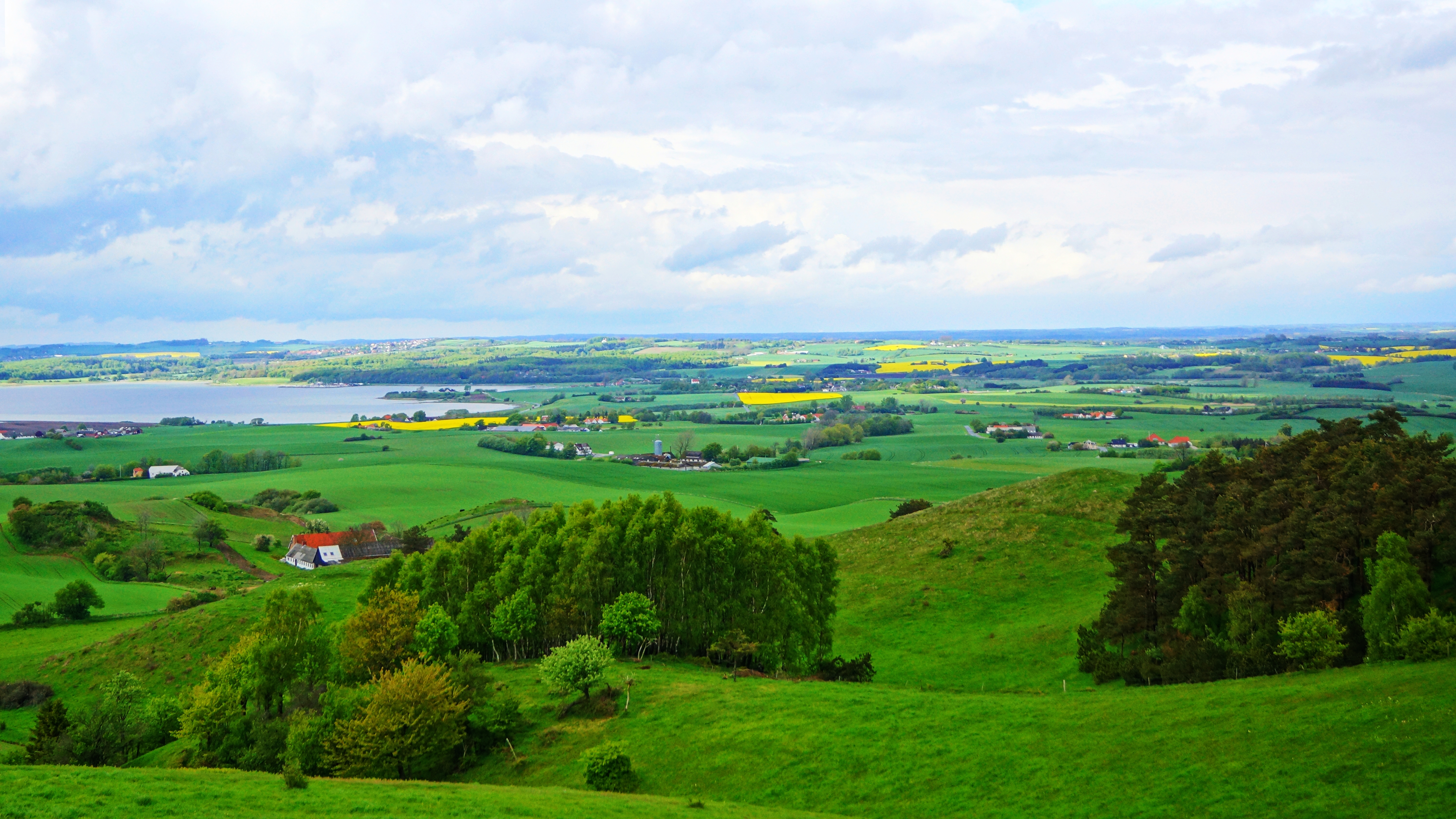 Retning Kalø